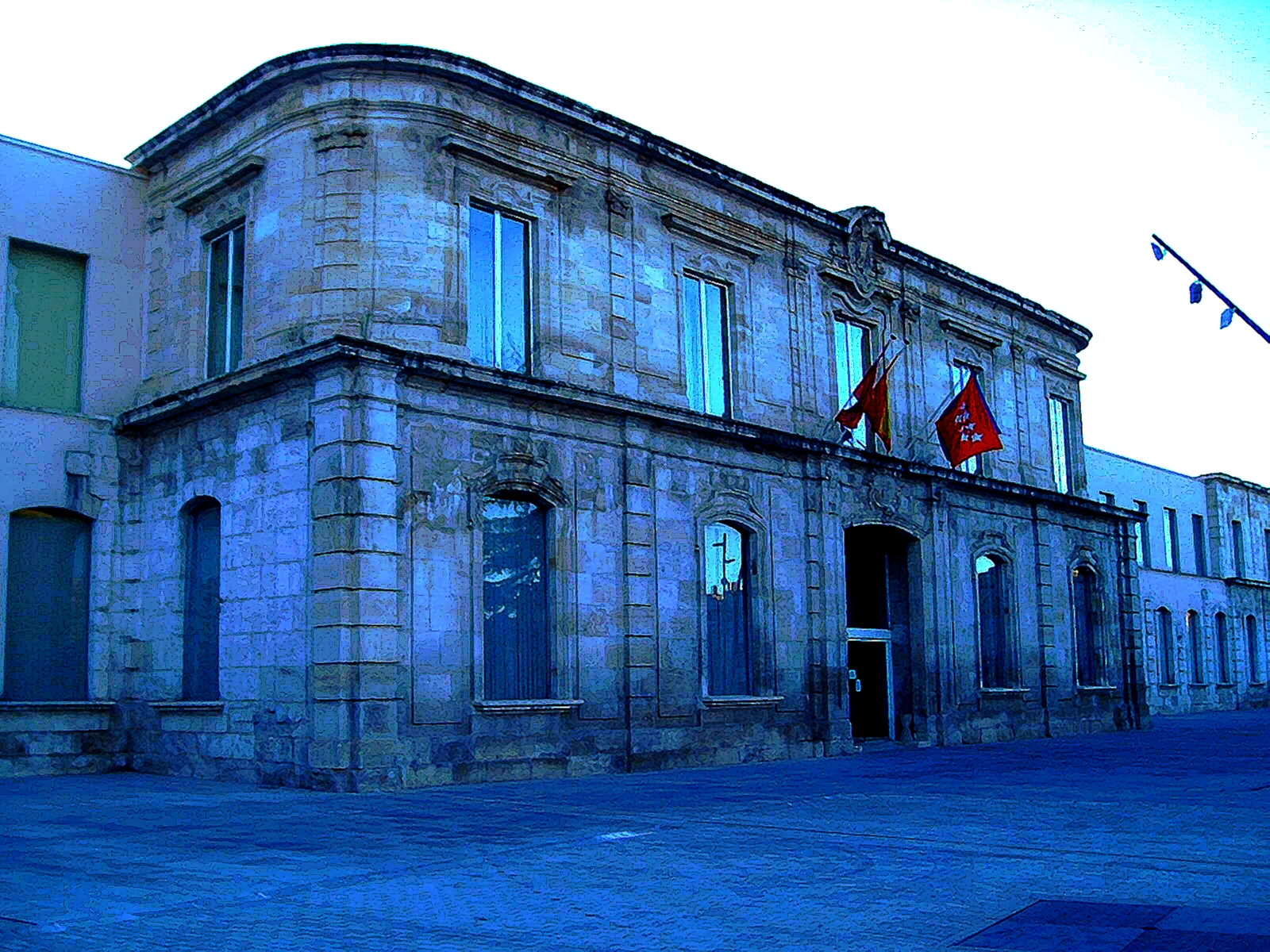 Real Sitio de San Fernando 2011.